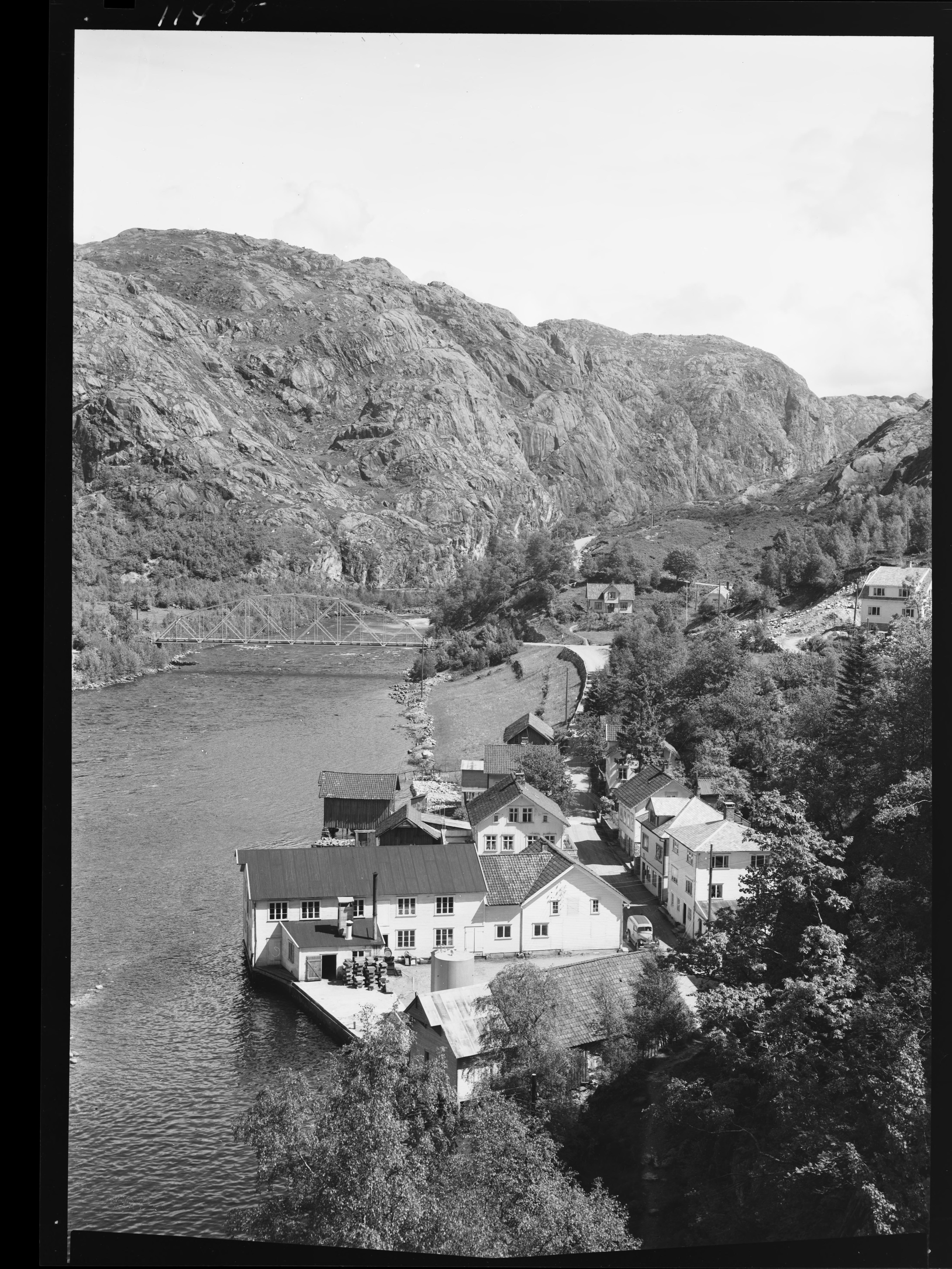 Bildet er hentet fra Nasjonalbibliotekets bildesamling. Anmerkninger til bildet var: fotograf ukjent Åna-Sira, Sokndal, Rogaland